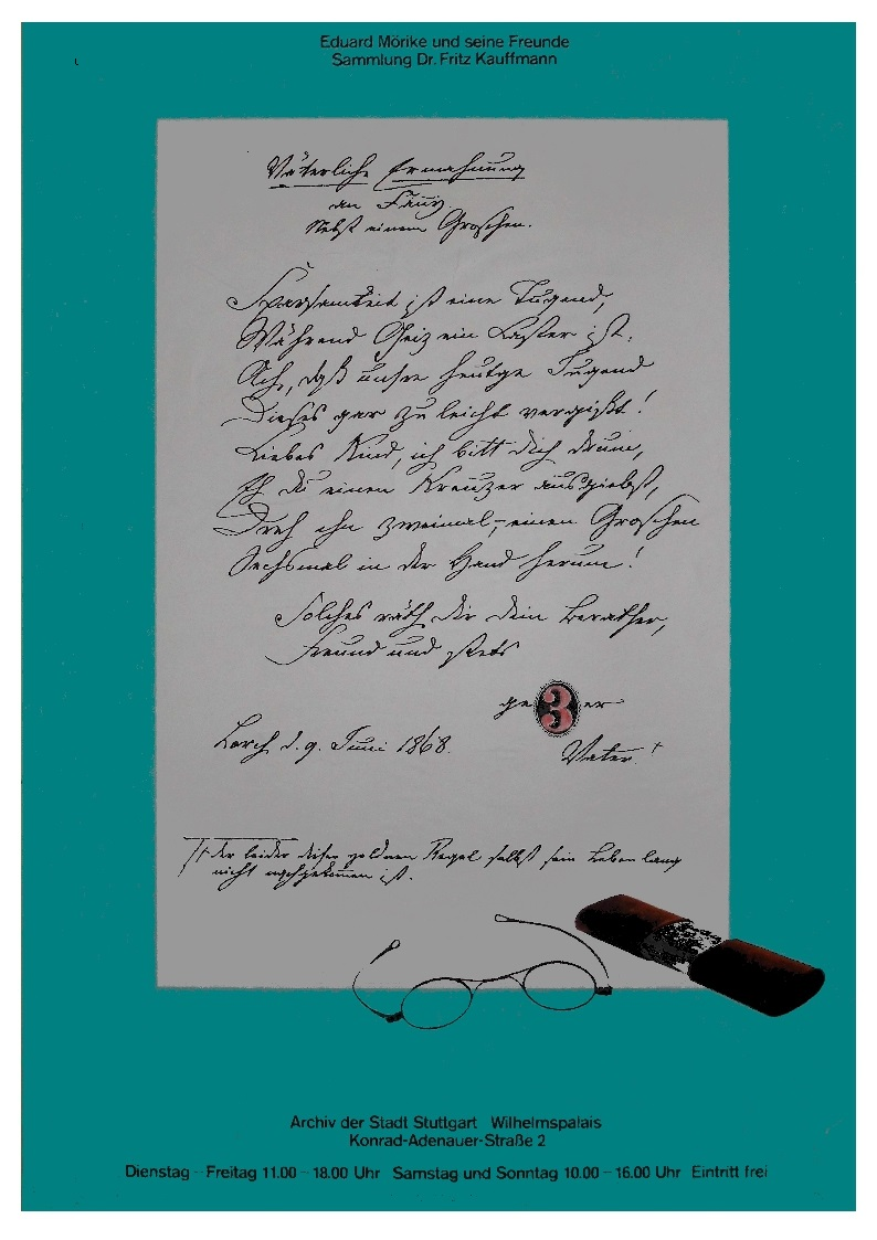 Plakat zur Dauerausstellung (Eintritt frei) der Sammlung "Eduard Mörike und seine Freunde" von Dr. Fritz Kauffmann